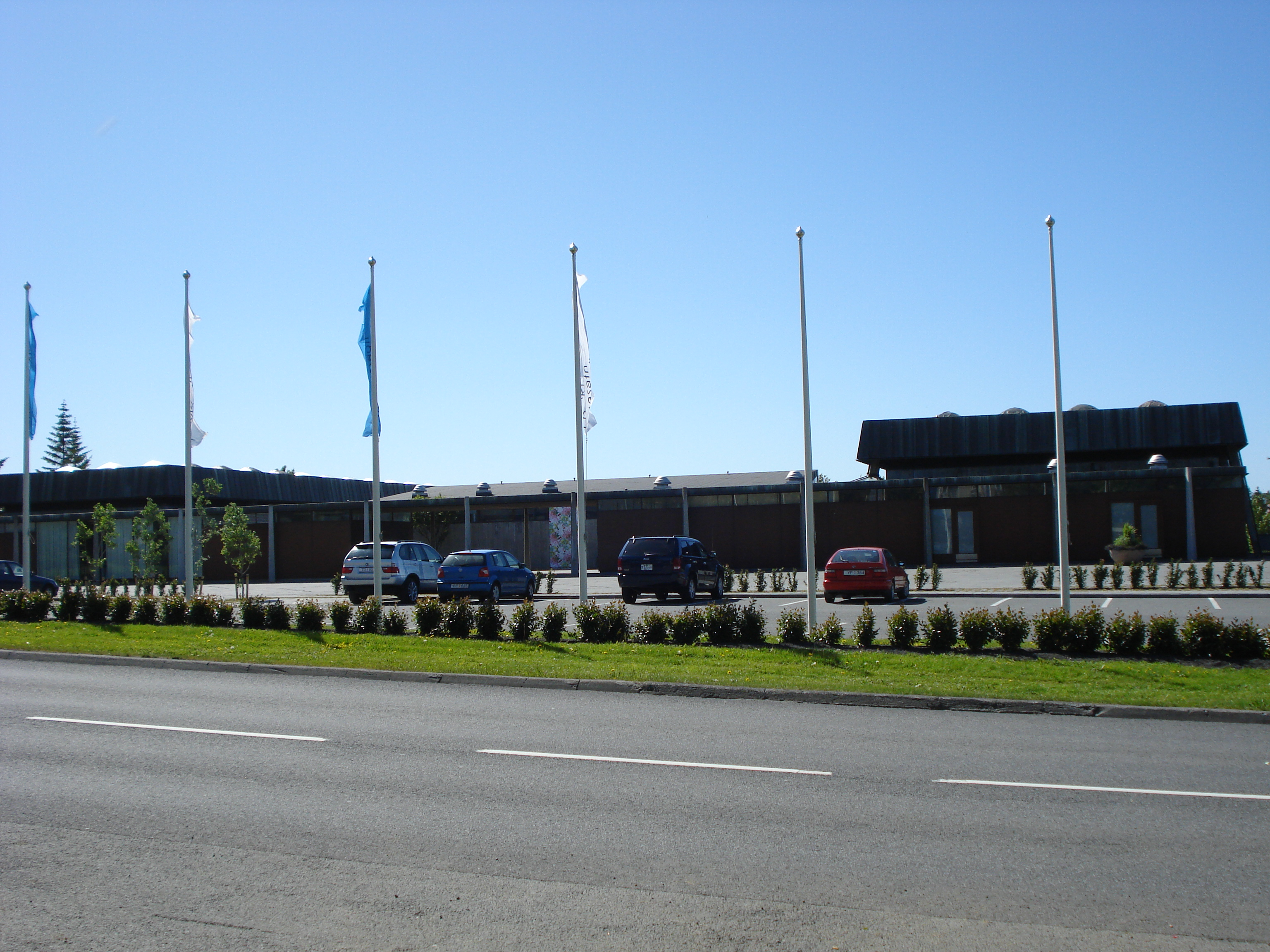 Kjarval museum, Kjarvalsafn, Reykjavik